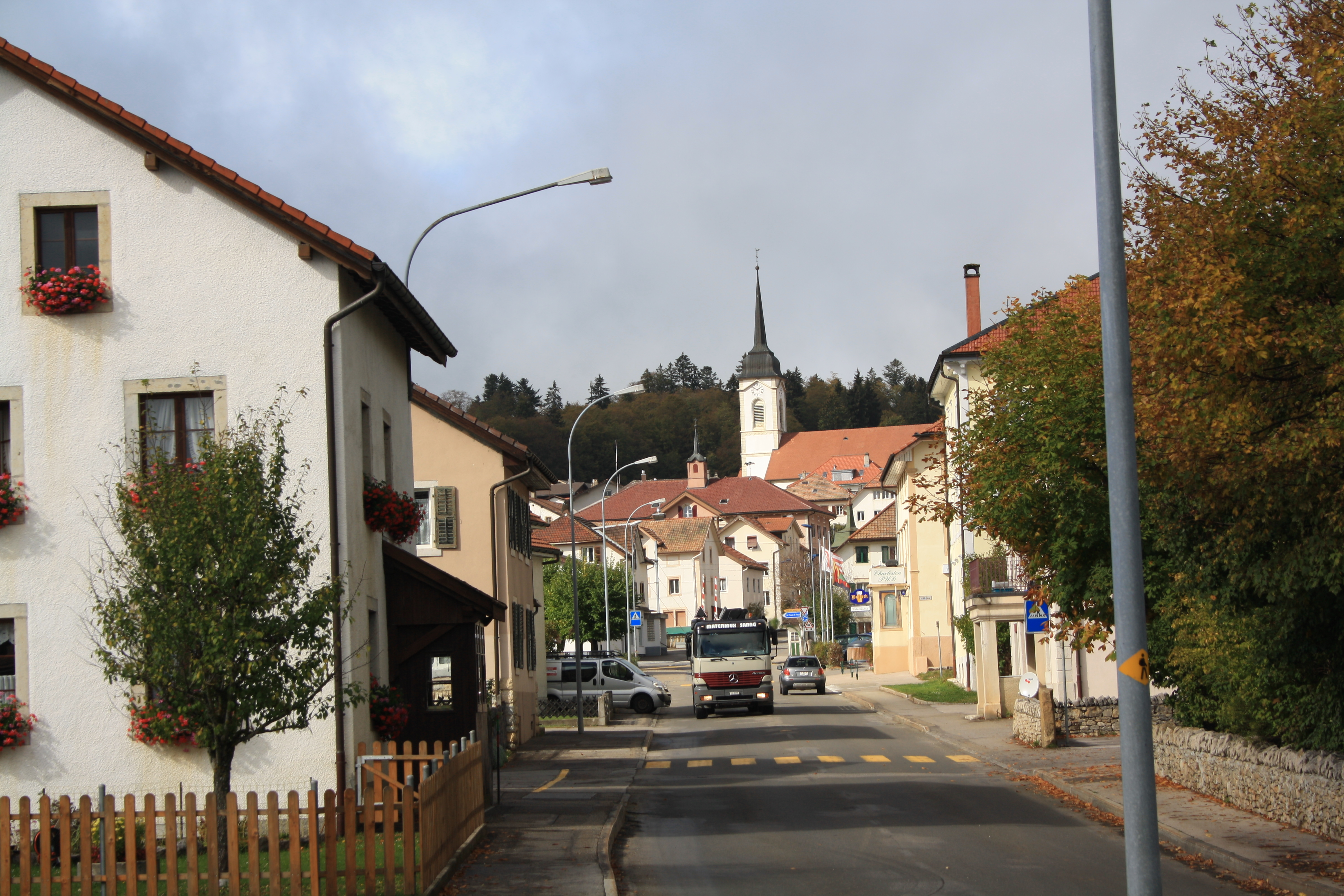 Les Breuleux